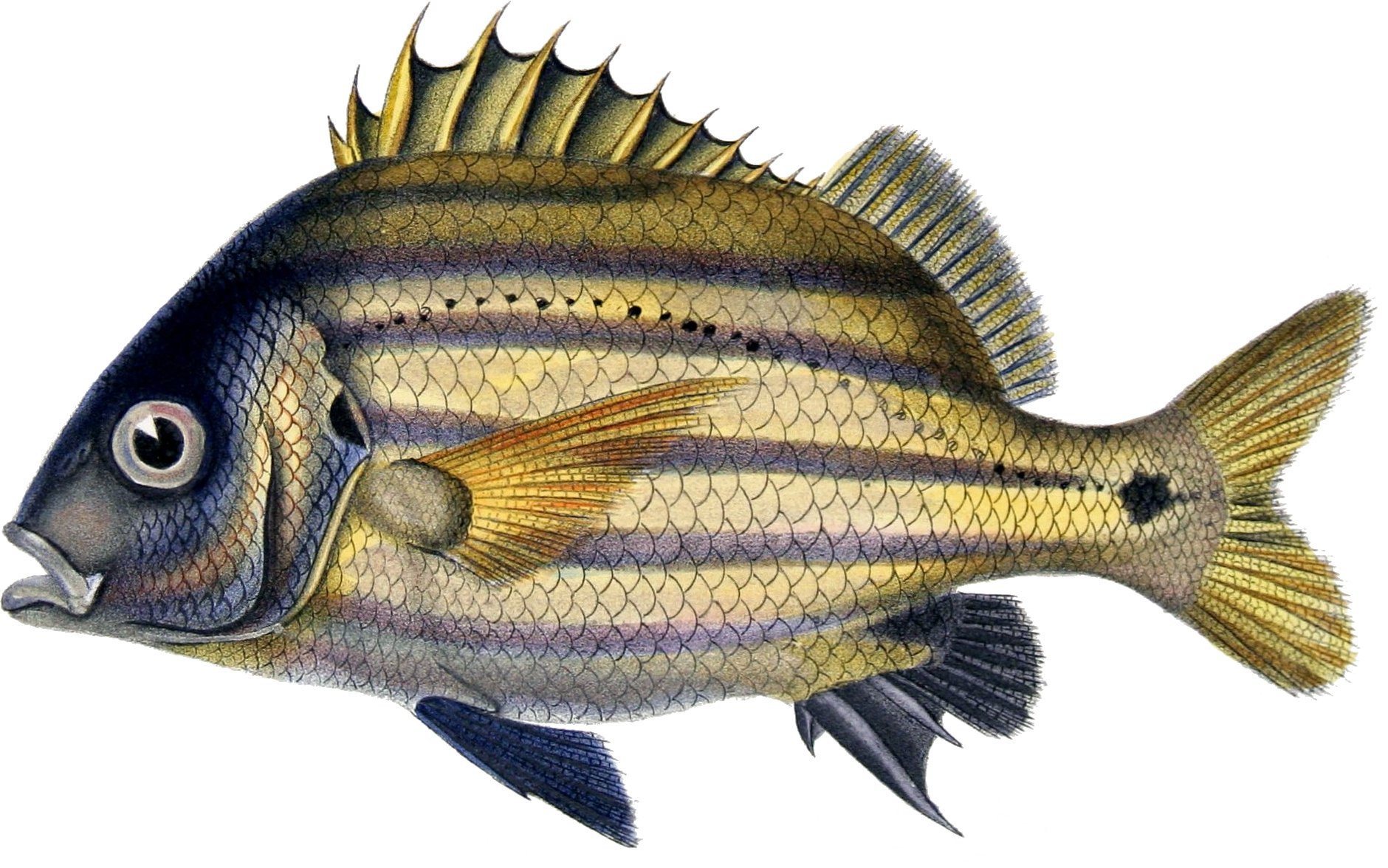 Pristipoma bicolor Cast. = Anisotremus moricandi (Ranzani, 1842)